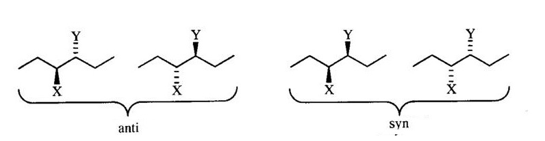 anti e sin